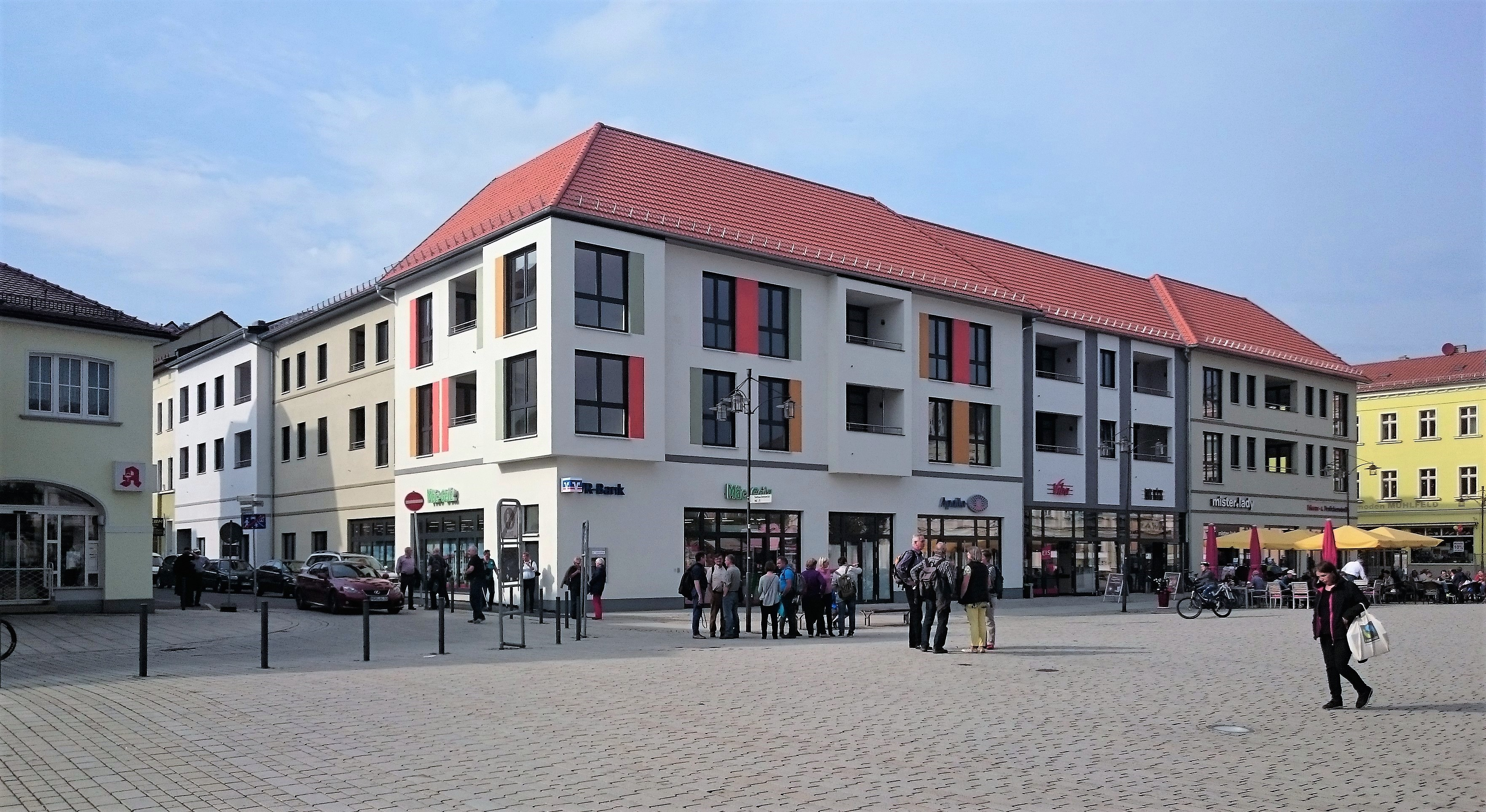 Westseite des Marktes in Meiningen.